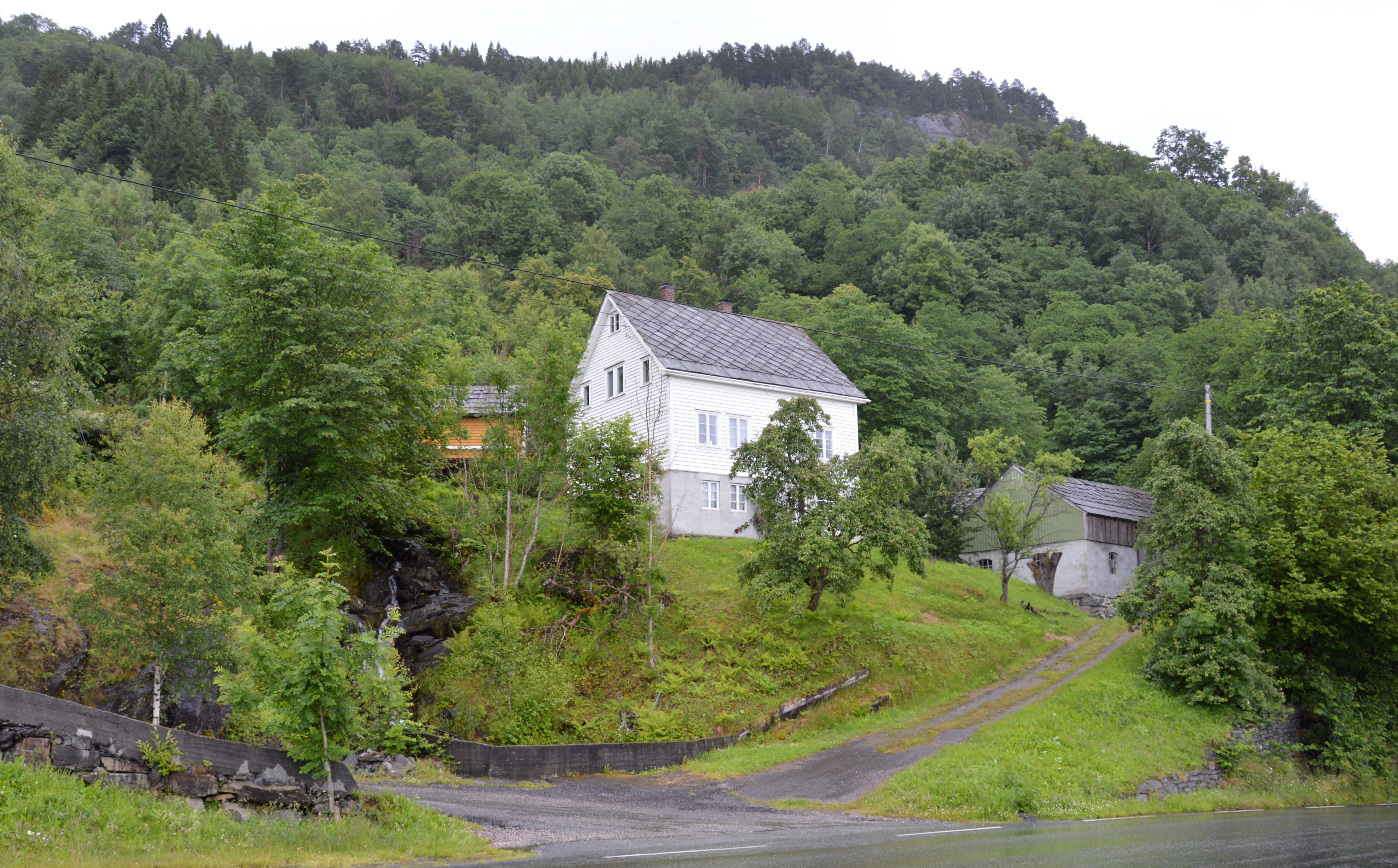 Steinsto